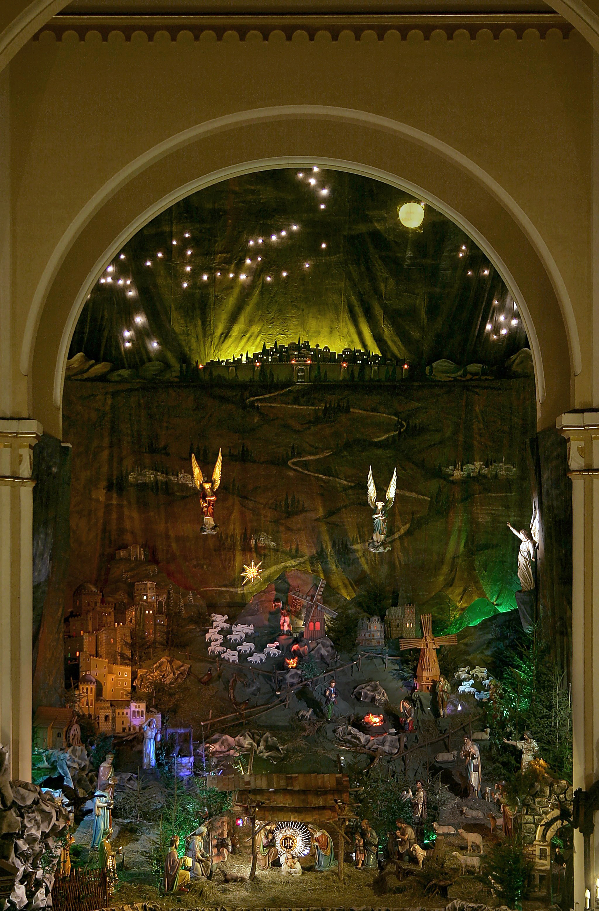 Crib in Katowice Panewniki, Poland (2005)